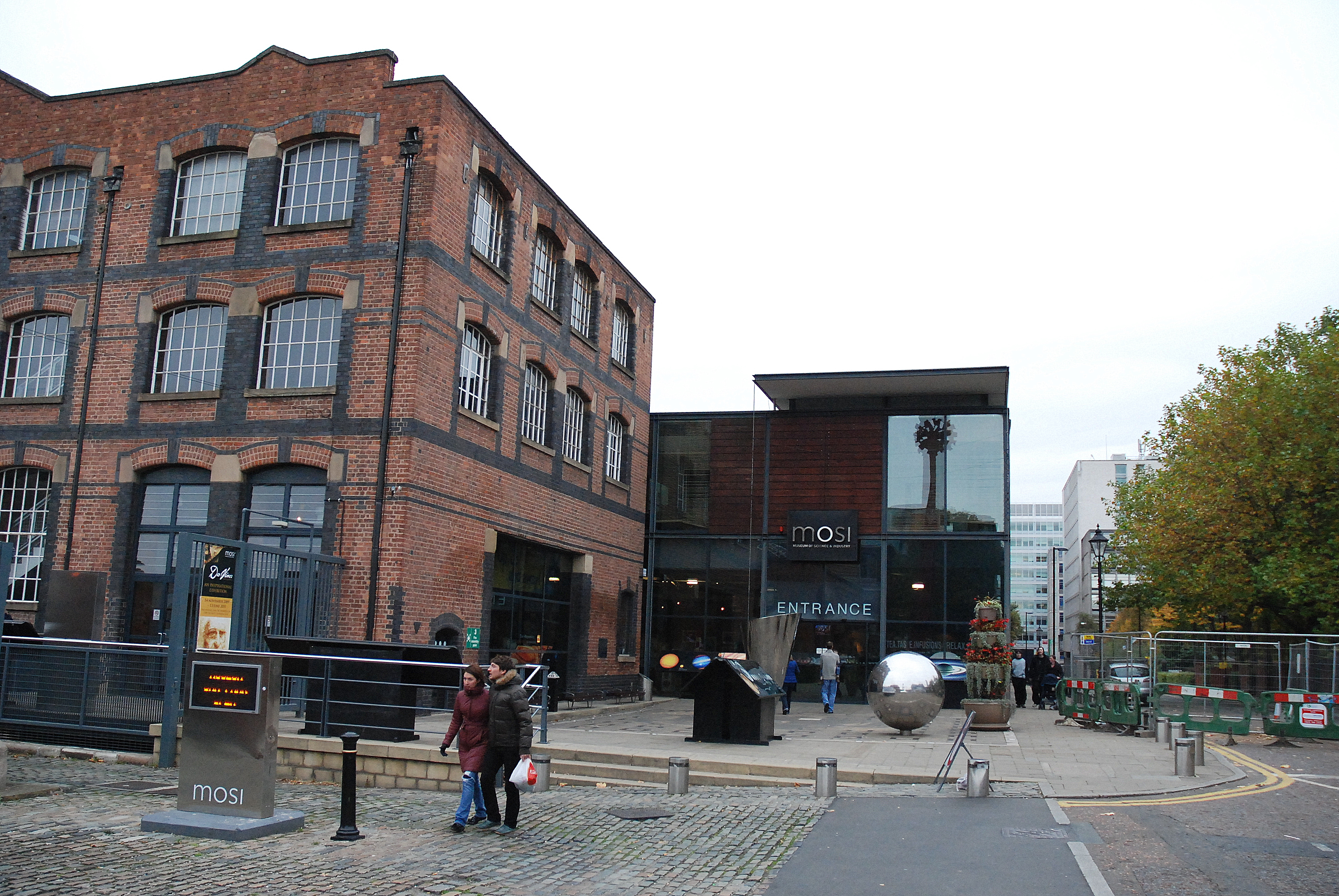 Museum of Science and Industry in Manchester, Engeland